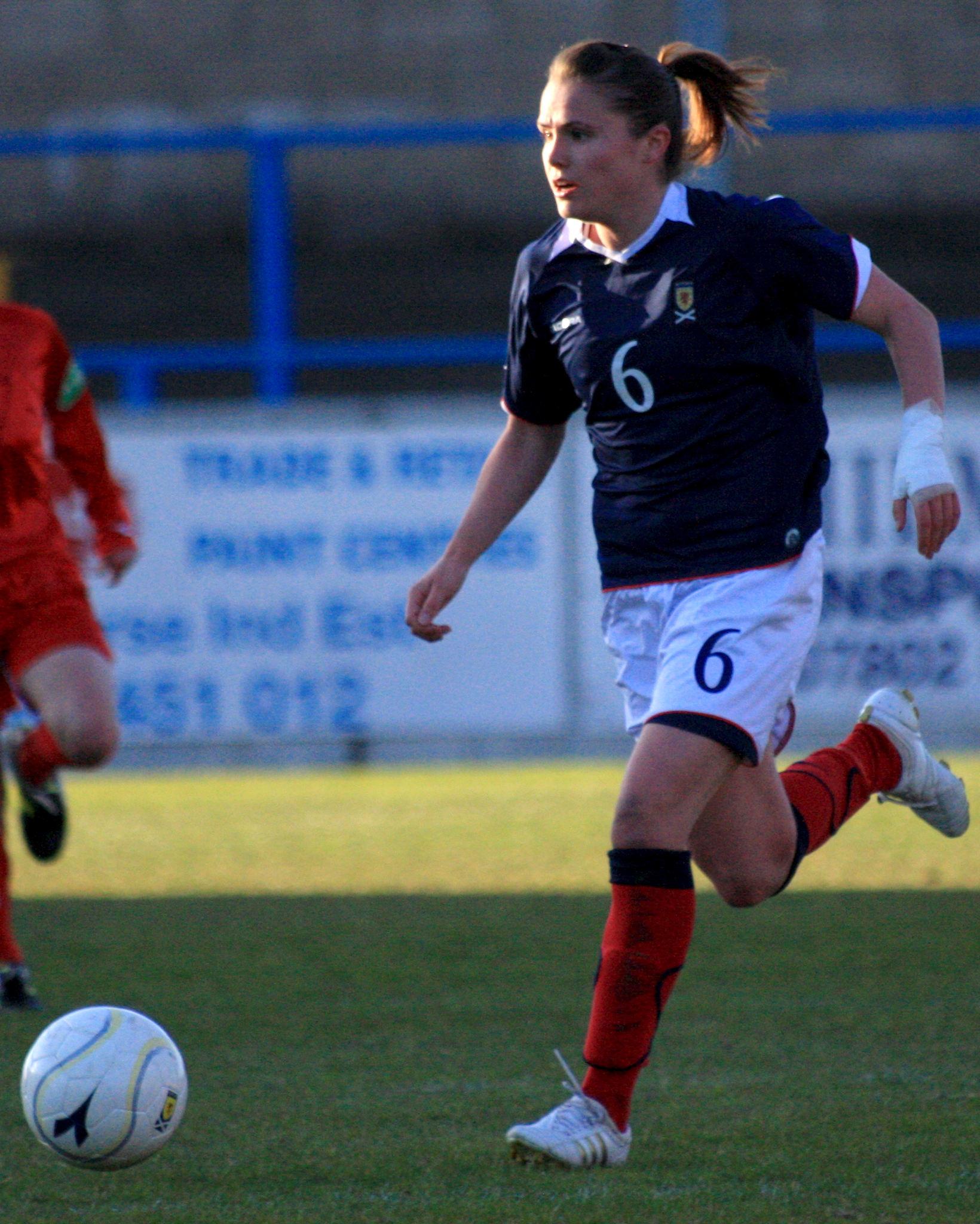 No. 6